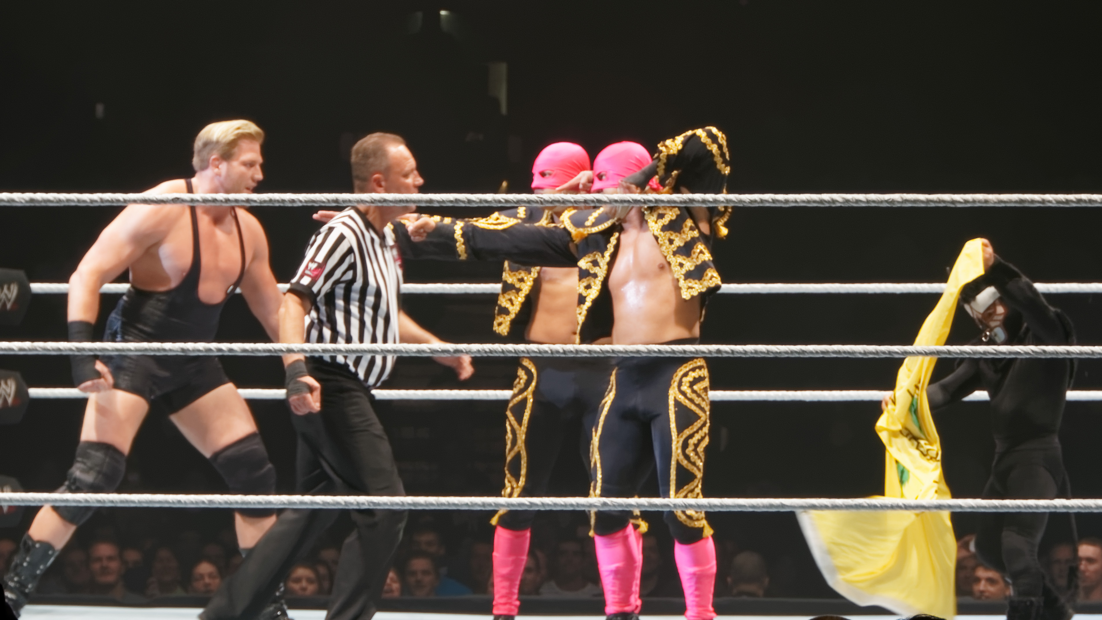 Матадоры с Джеком Сваггером на хаус-шоу WWE